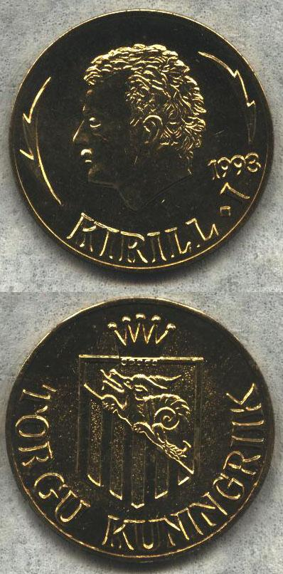 Esimene Torgu "kirill" 1993.a